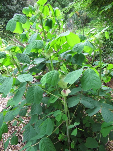 Amicia zygomeris, Fabaceae